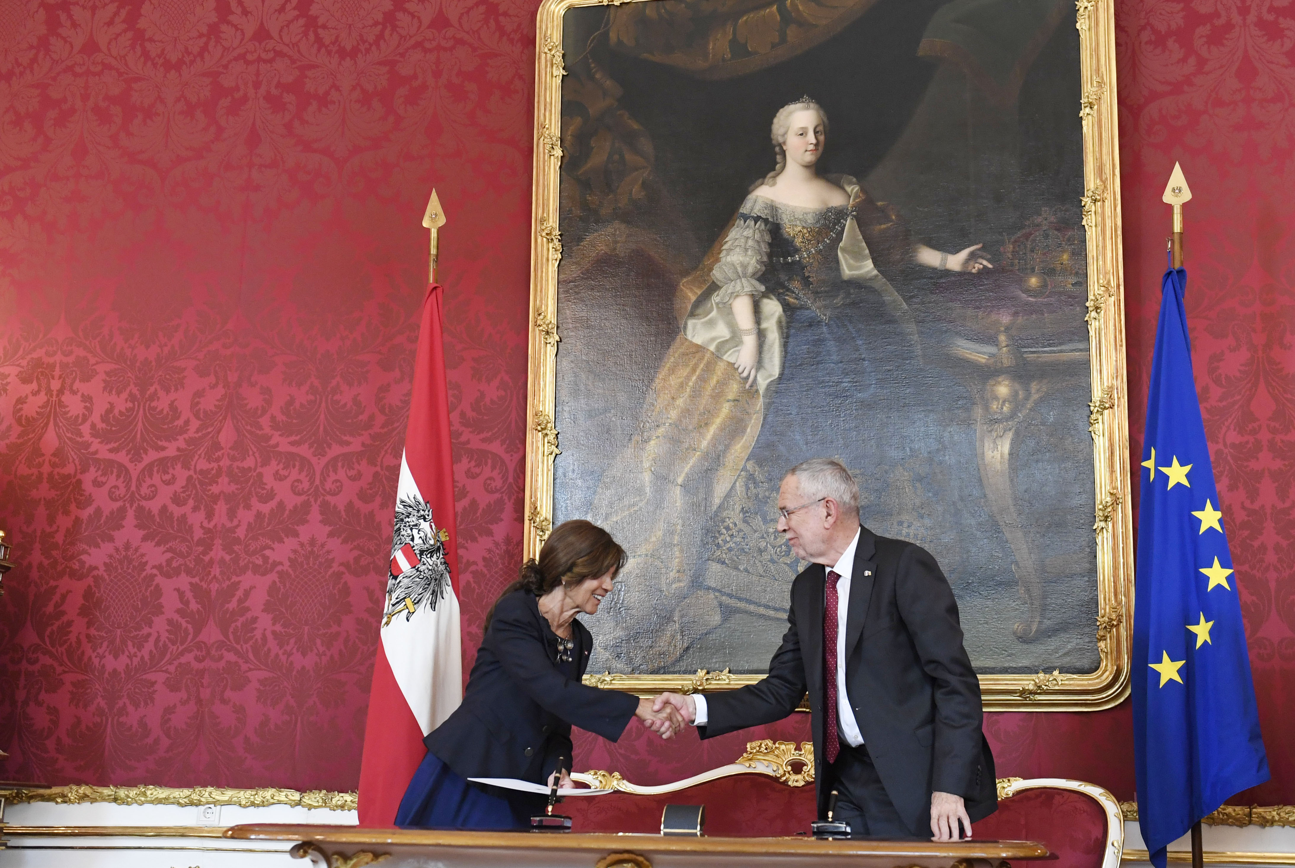 Am 3. Juni 2019 wurde Mag. Alexander Schallenberg als Bundesminister für Europa, Integration und Äußeres angelobt. Foto: Mahmoud